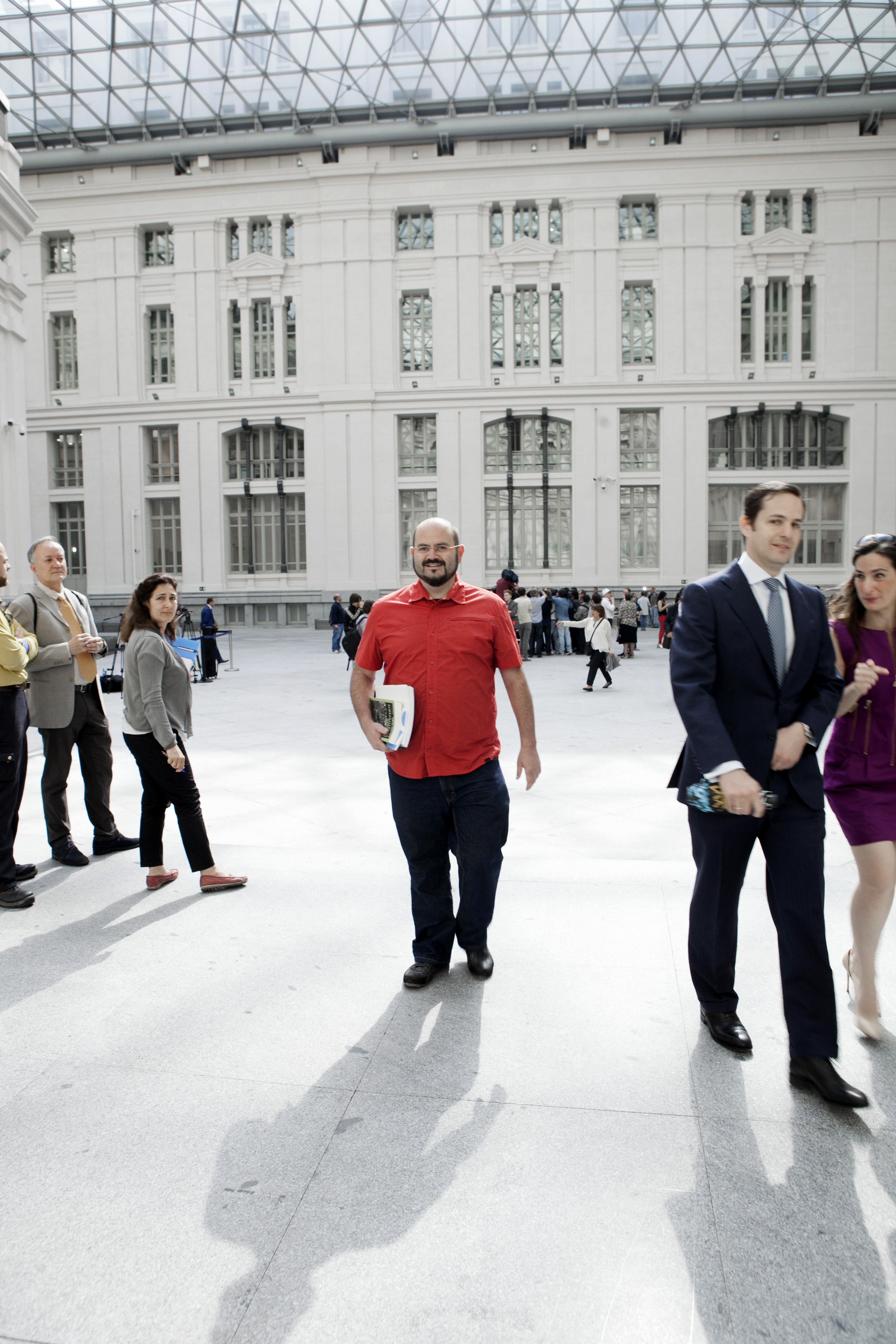 Investidura Manuela Carmena como alcaldesa Madrid